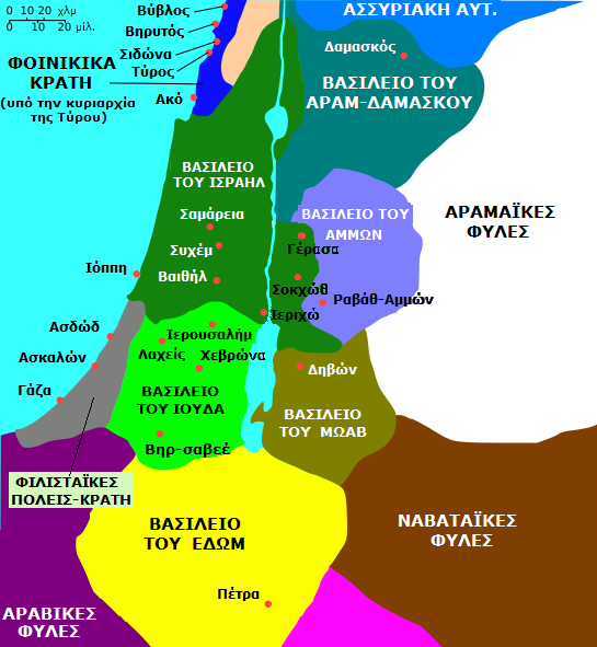 Greek map of the Levant circa 830 CE, based on this.